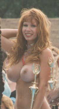 Amanda Adams